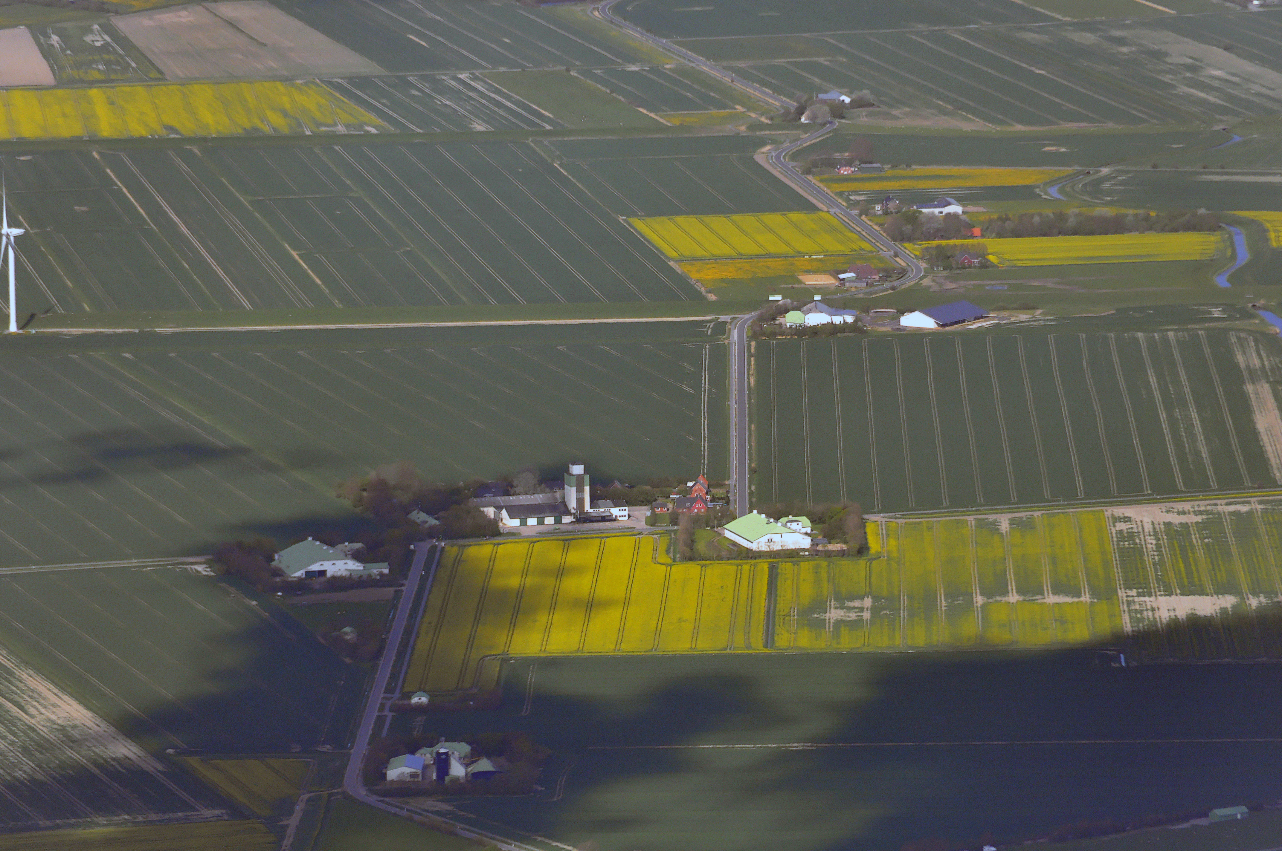 Schrägluftbild (Blickrichtung Nordost) des Mittleren Abschnitts des Sönke-Nissen-Koogs mit dem Silo des Unternehmens Hauptgenossenschaft Nord und der umliegenden Wohnsiedlung (Weiler) sowie verschiedenen Bauernhöfen während der Rapsblüte im Mai. Im Bildhintergrund folgt der Nordteil des Reußenkoogs und des Bordelumer Koogs